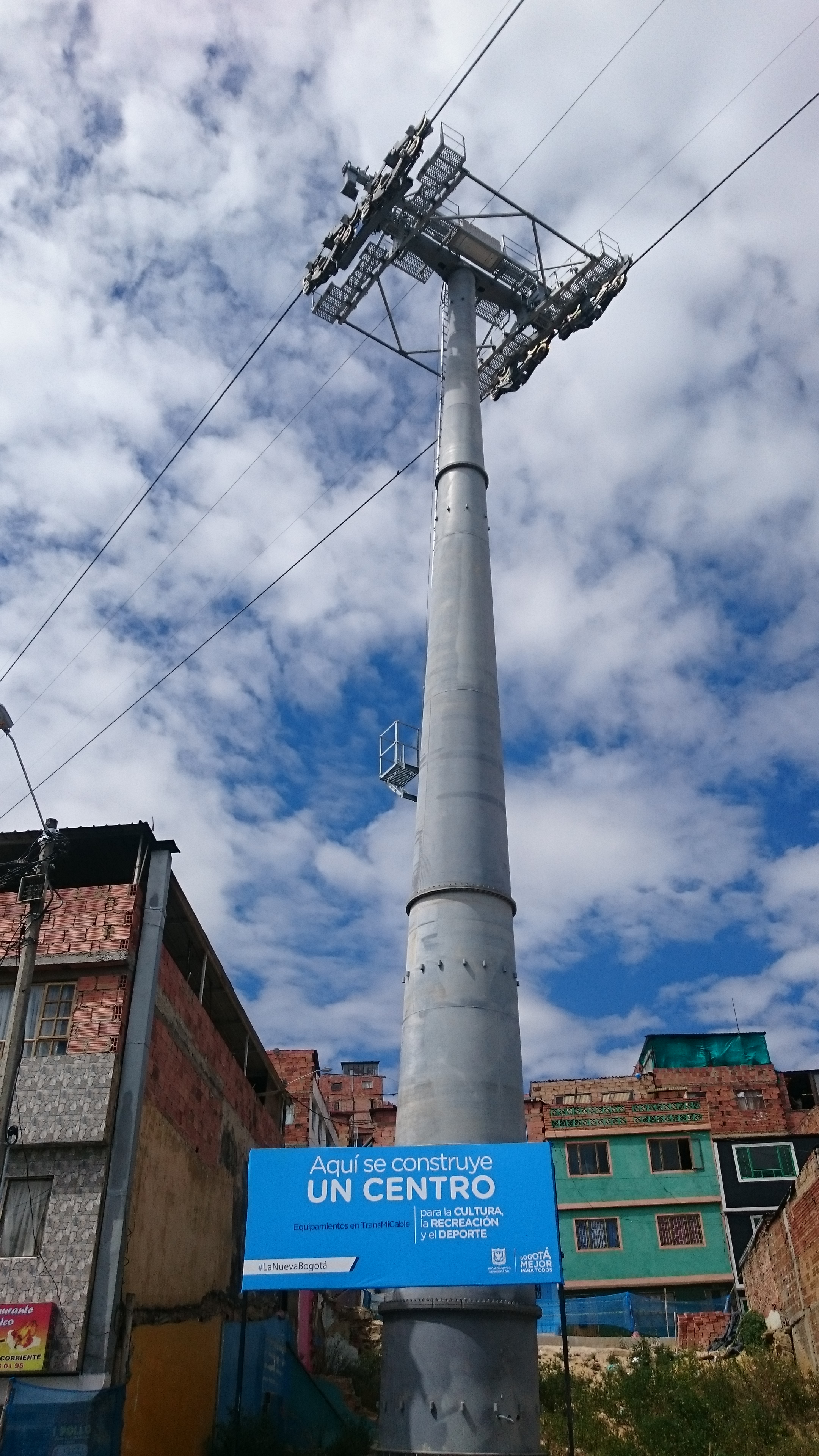 Visita técnica al TransMiCable 10 de febrero de 2018